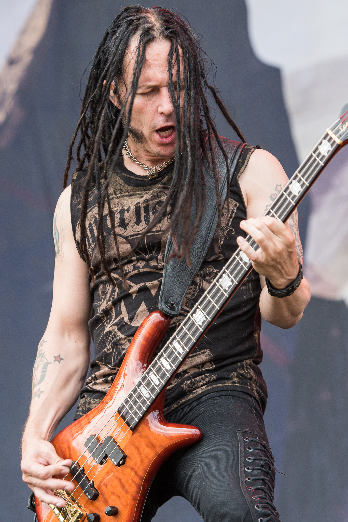 ARGO-Konzerte,Disturbed,Festival,John Moyer,Konzert,Livekonzert,Livemusik,Musik,RiP,Rock im Park 2016,Seat Zeppelin Stage